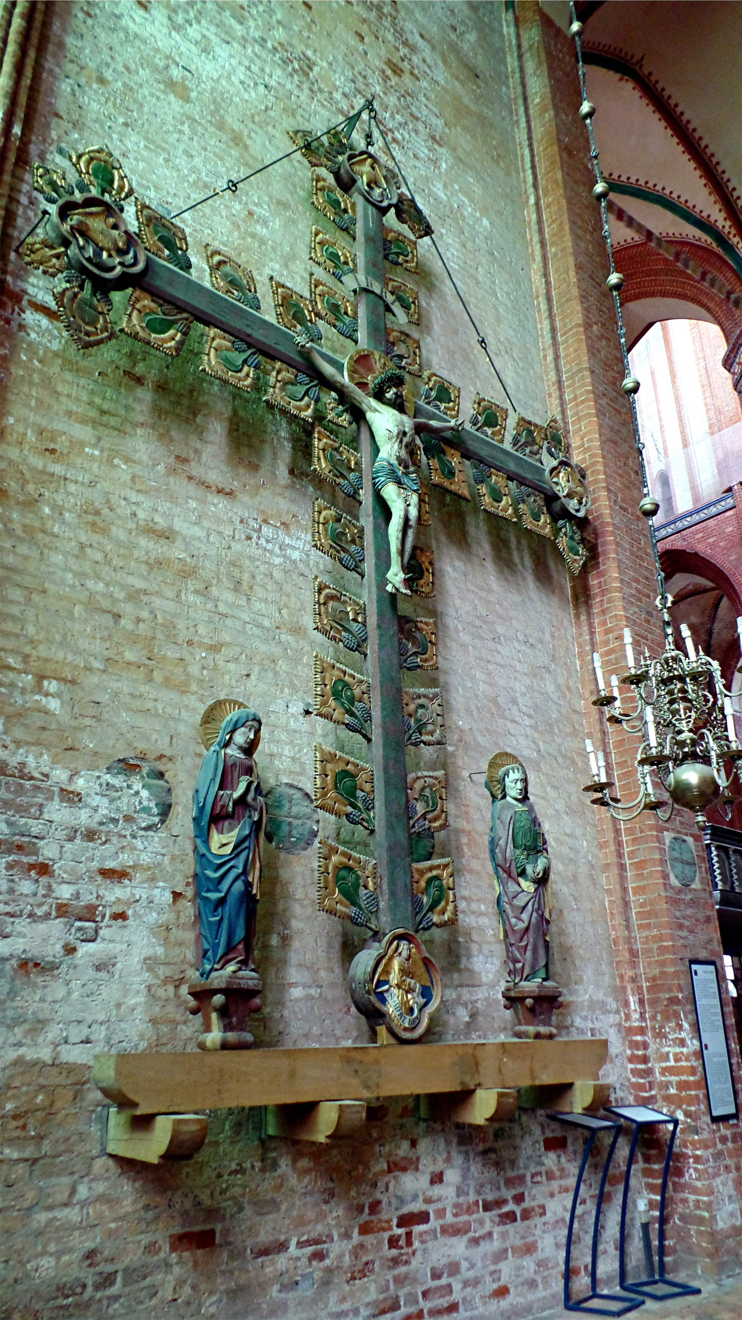 Triumpfkreuz von St. Georg in Wismar, z. Z. in St. Nikolai